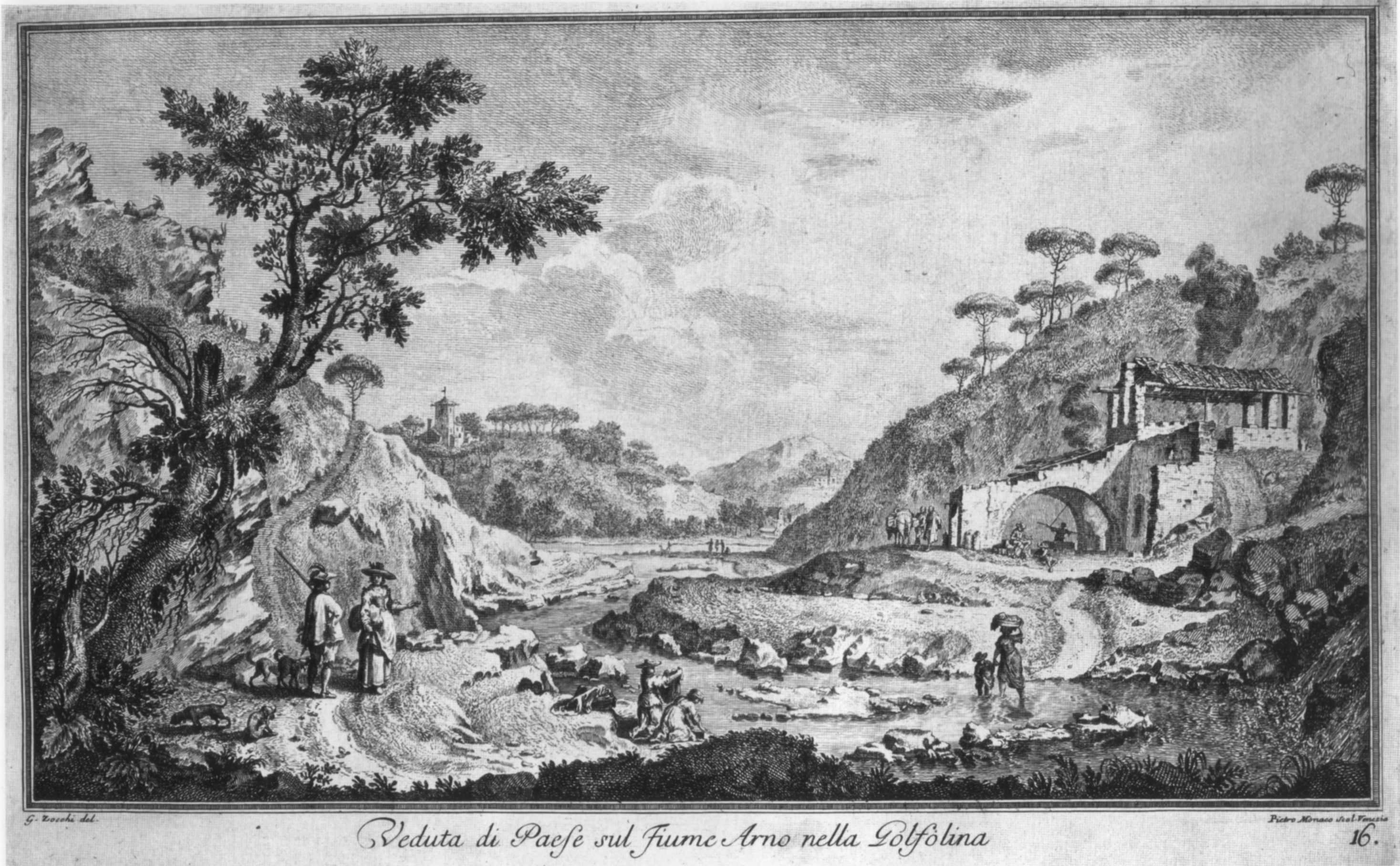 Zocchi, ville 18 gonfolina